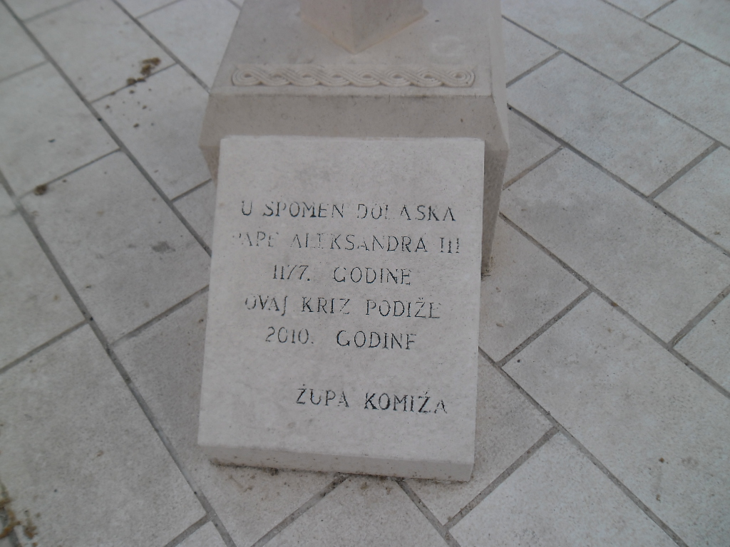 Komiža